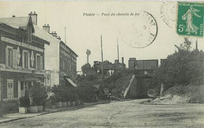 Plaisir (Yvelines-France) : pont de chemin de fer à côté de la gare de Plaisir-Grignon